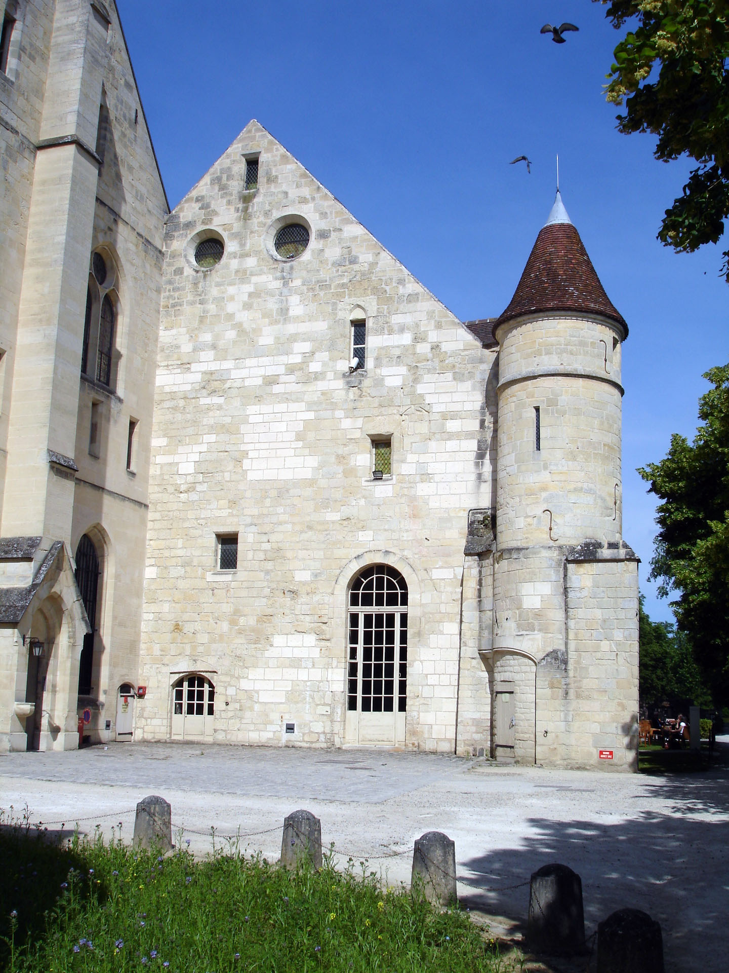 Pignon ouest du bâtiment des latrines de l'abbaye de Royaumont, Val-d'Oise, France.